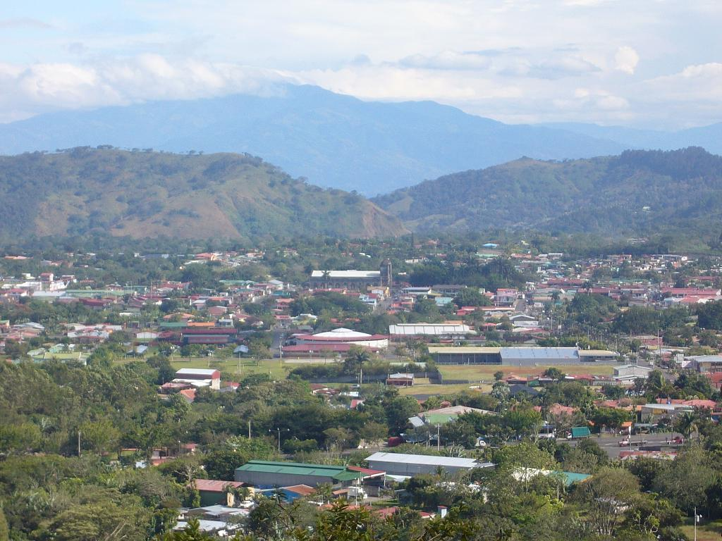 Palmares Centro, vista desde La Cima, San Ramón de Alajuela